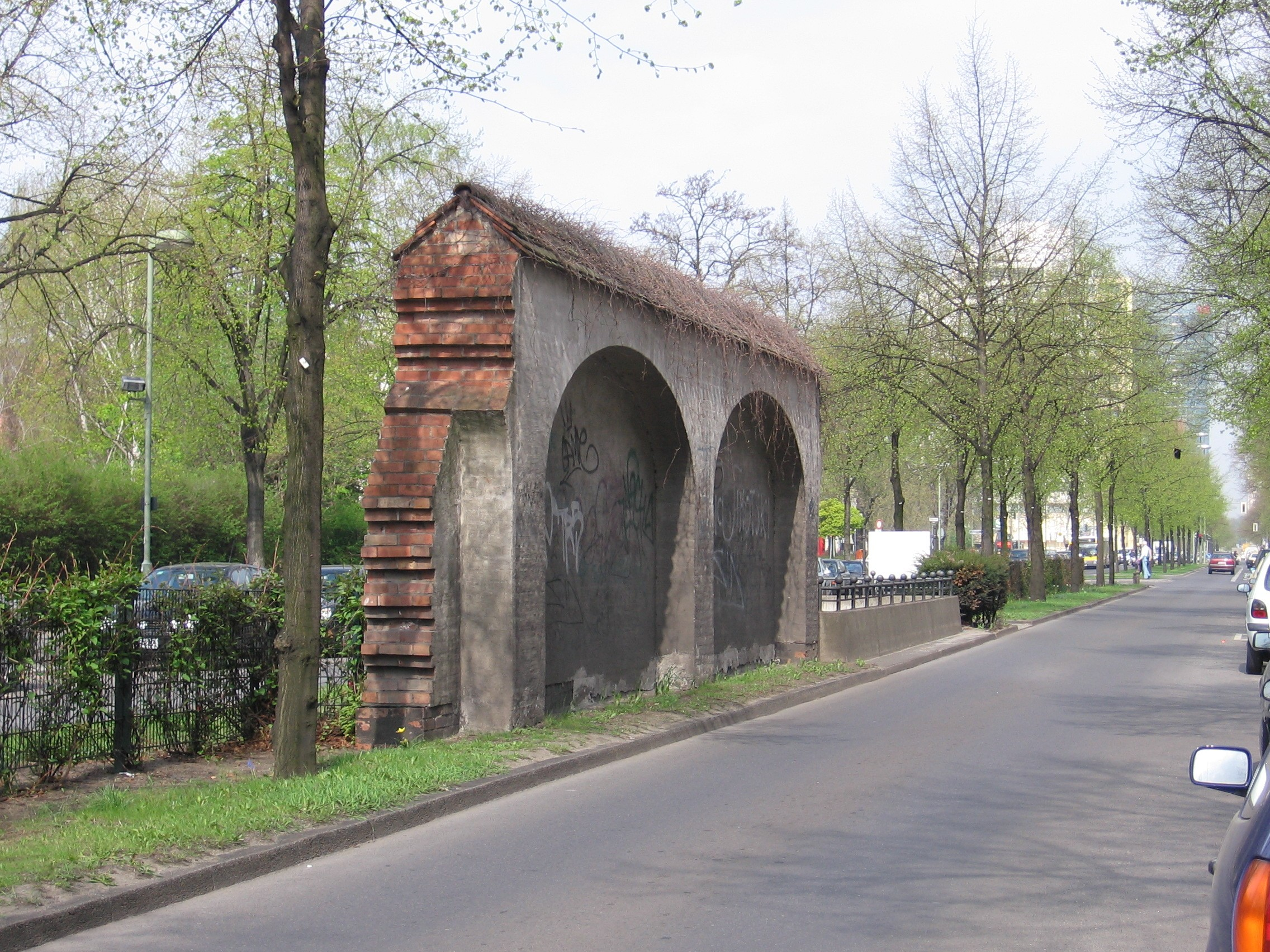 Teil der Berliner Akzisemauer, in den 1980er Jahren wieder aufgebaut